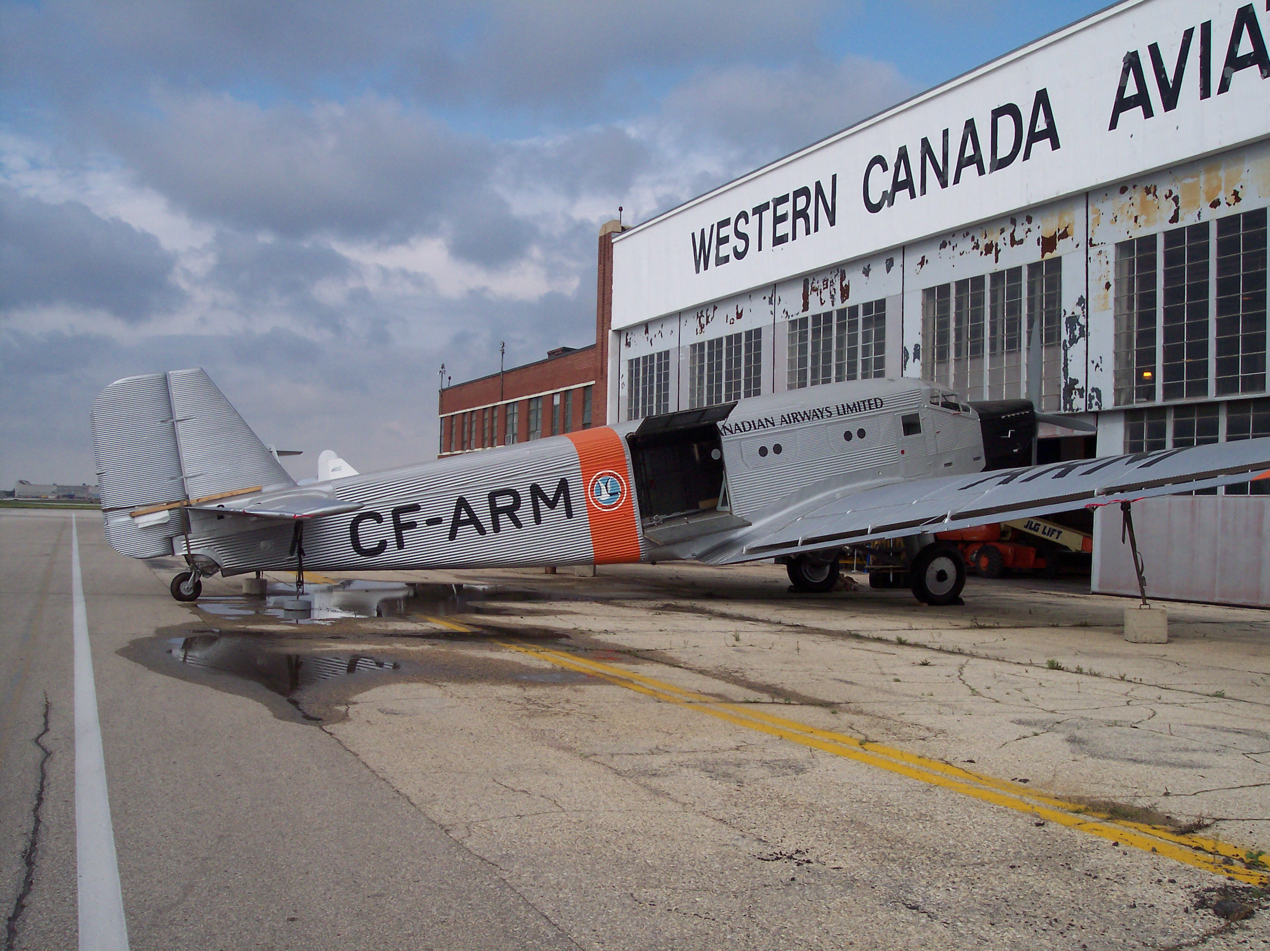 Aircraft Junkers Ju-52/1m